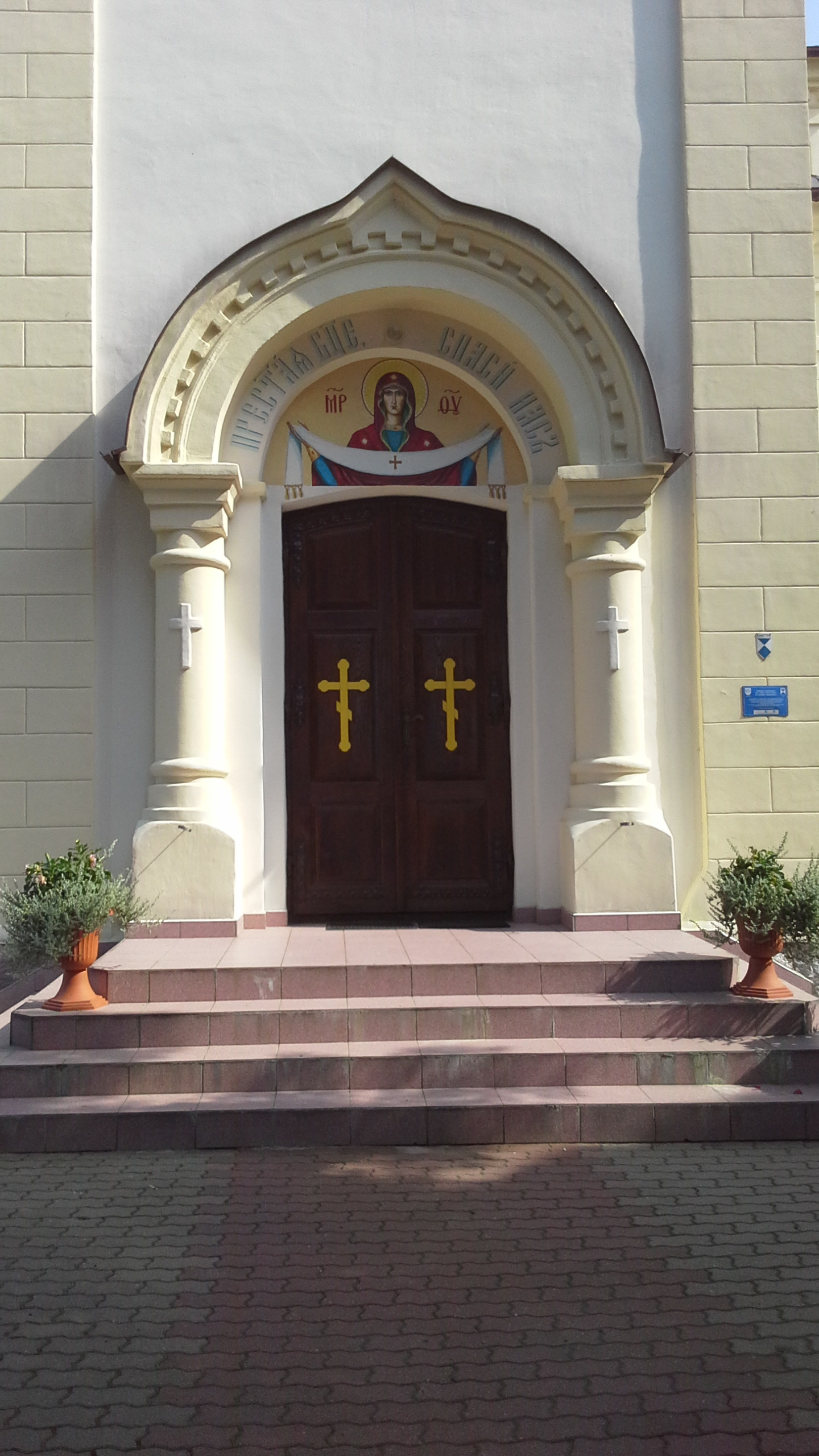 Portal główny cerkwi w Czarnej Cerkiewnej